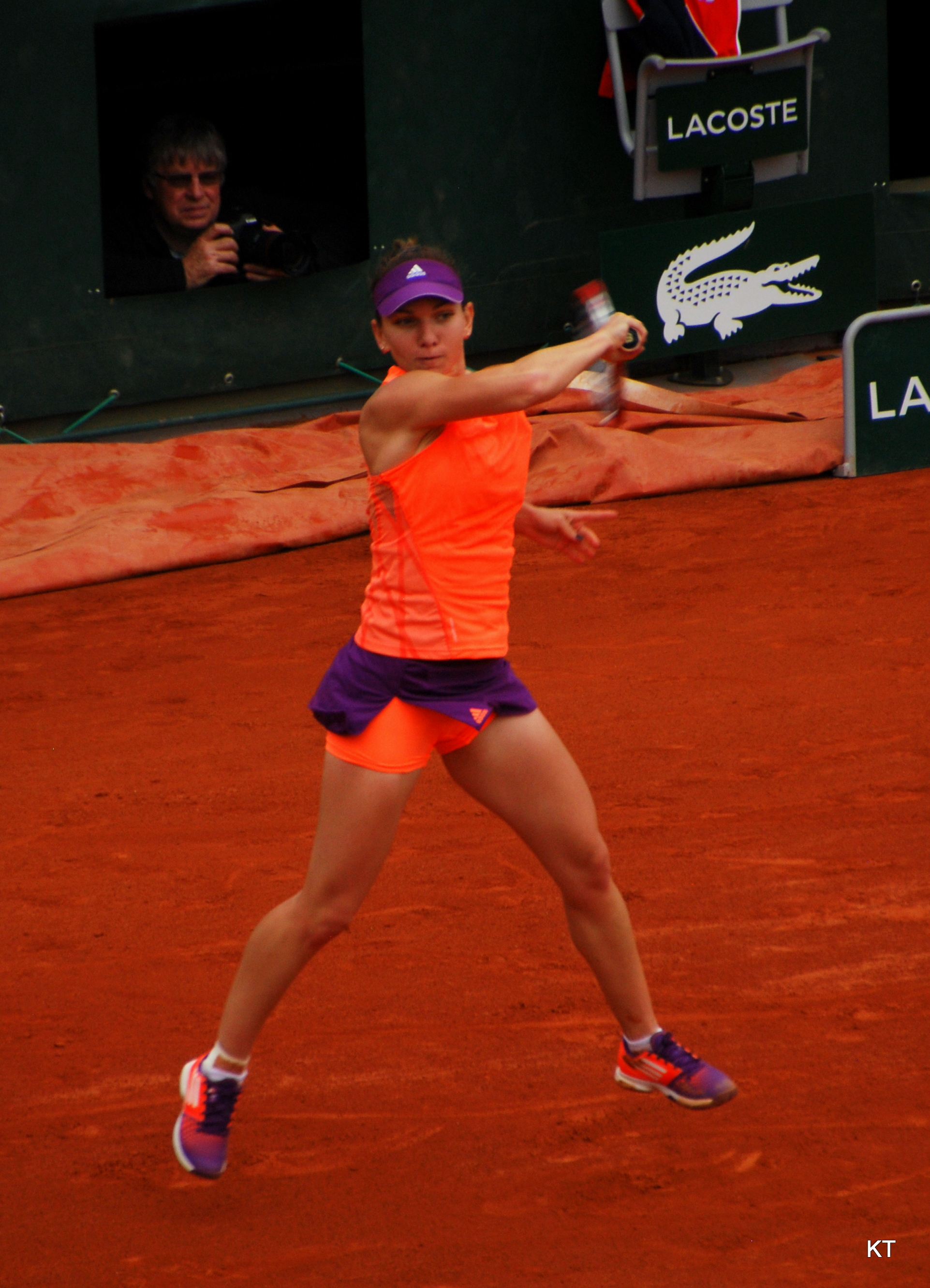 Simona Halep